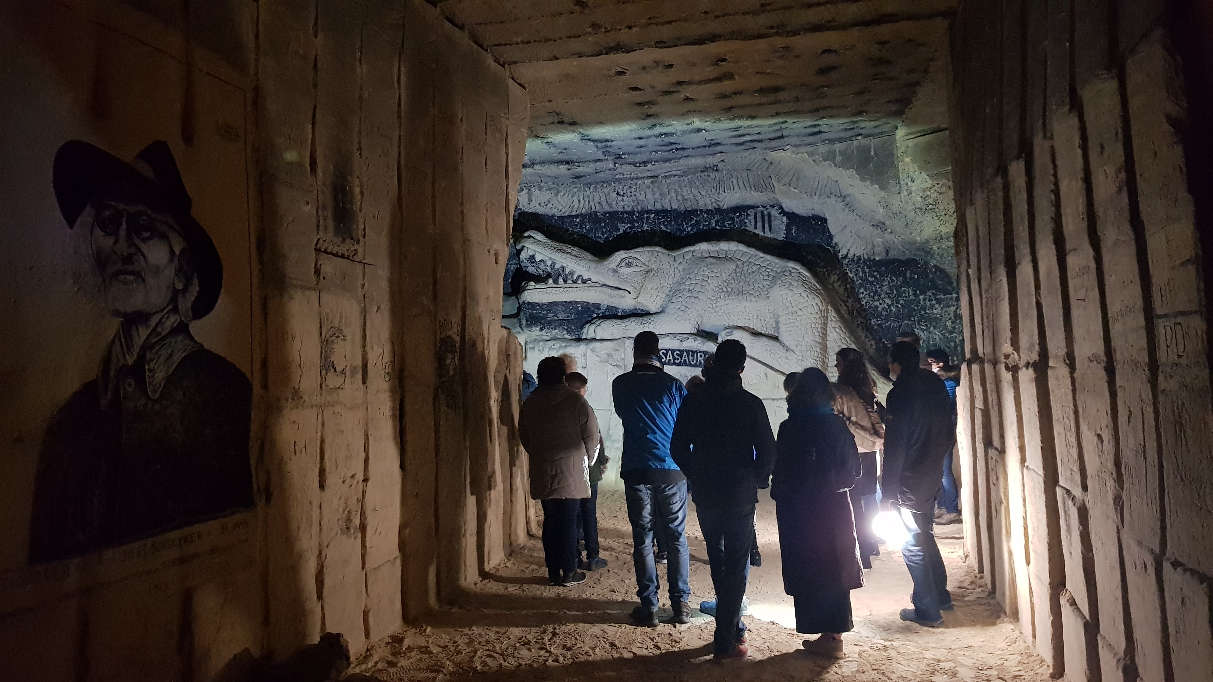 Gangenstelsel Zonneberg in de Sint-Pietersberg, Maastricht, Nederland